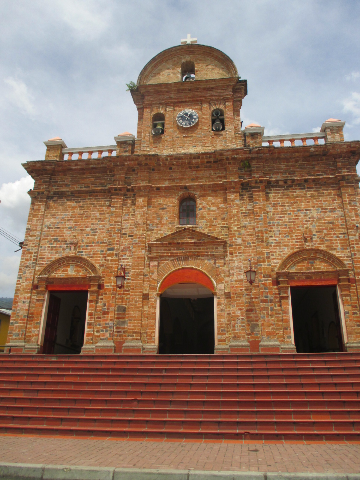 Template:Monumento en Colombia05656